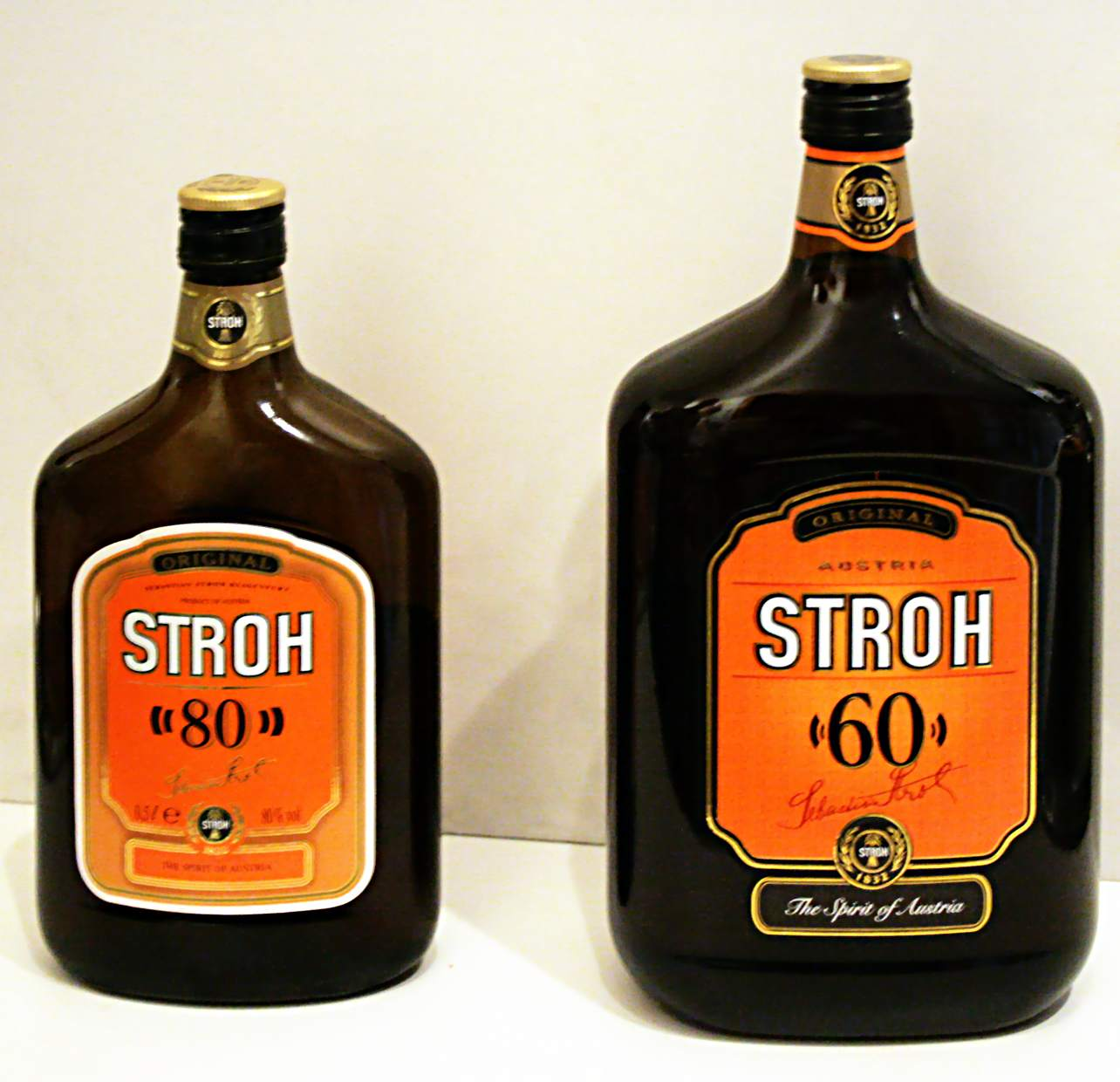 rum (Stroh)